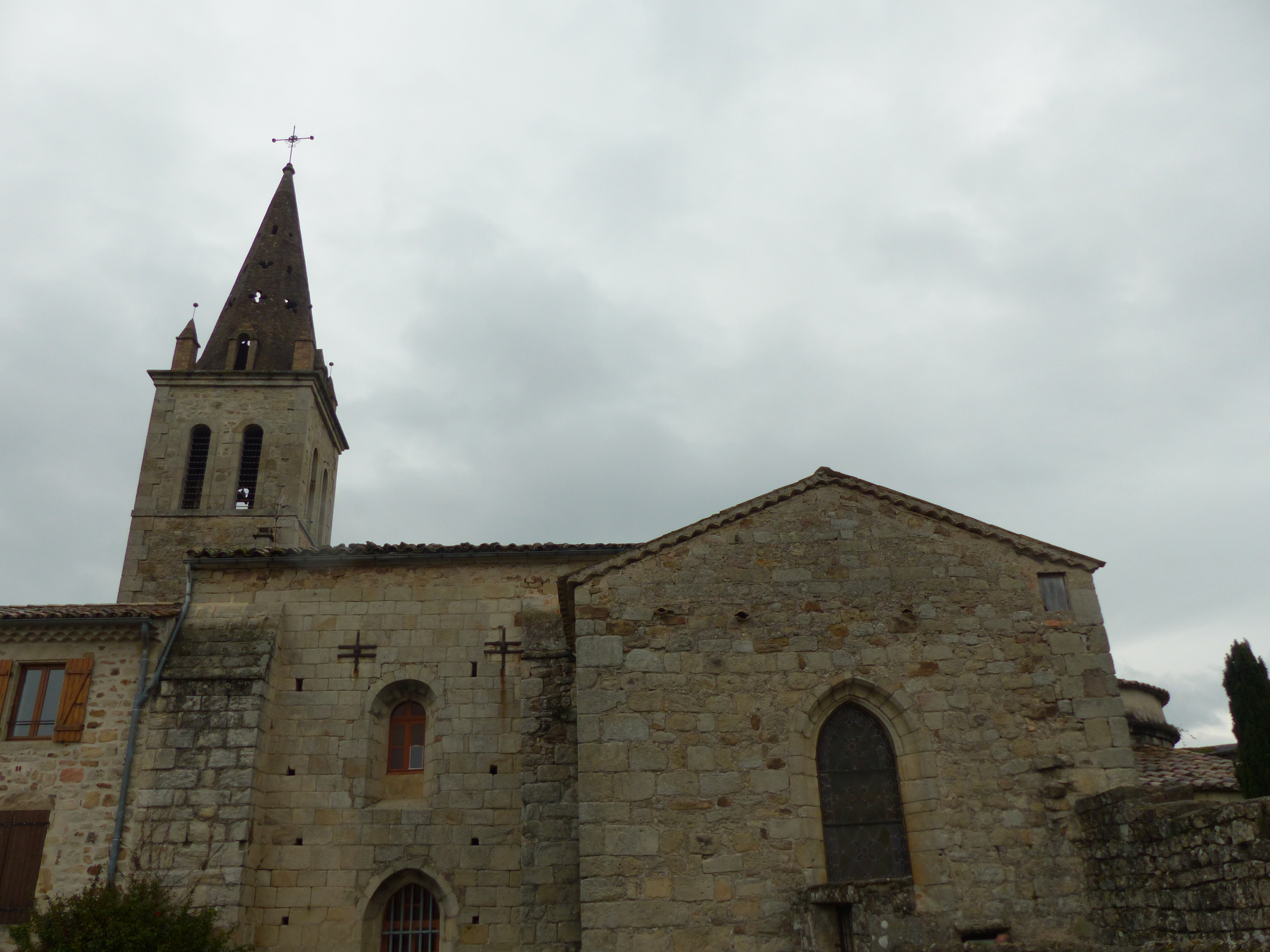 Église Saint-Julien de Saint-Julien-du-Serre